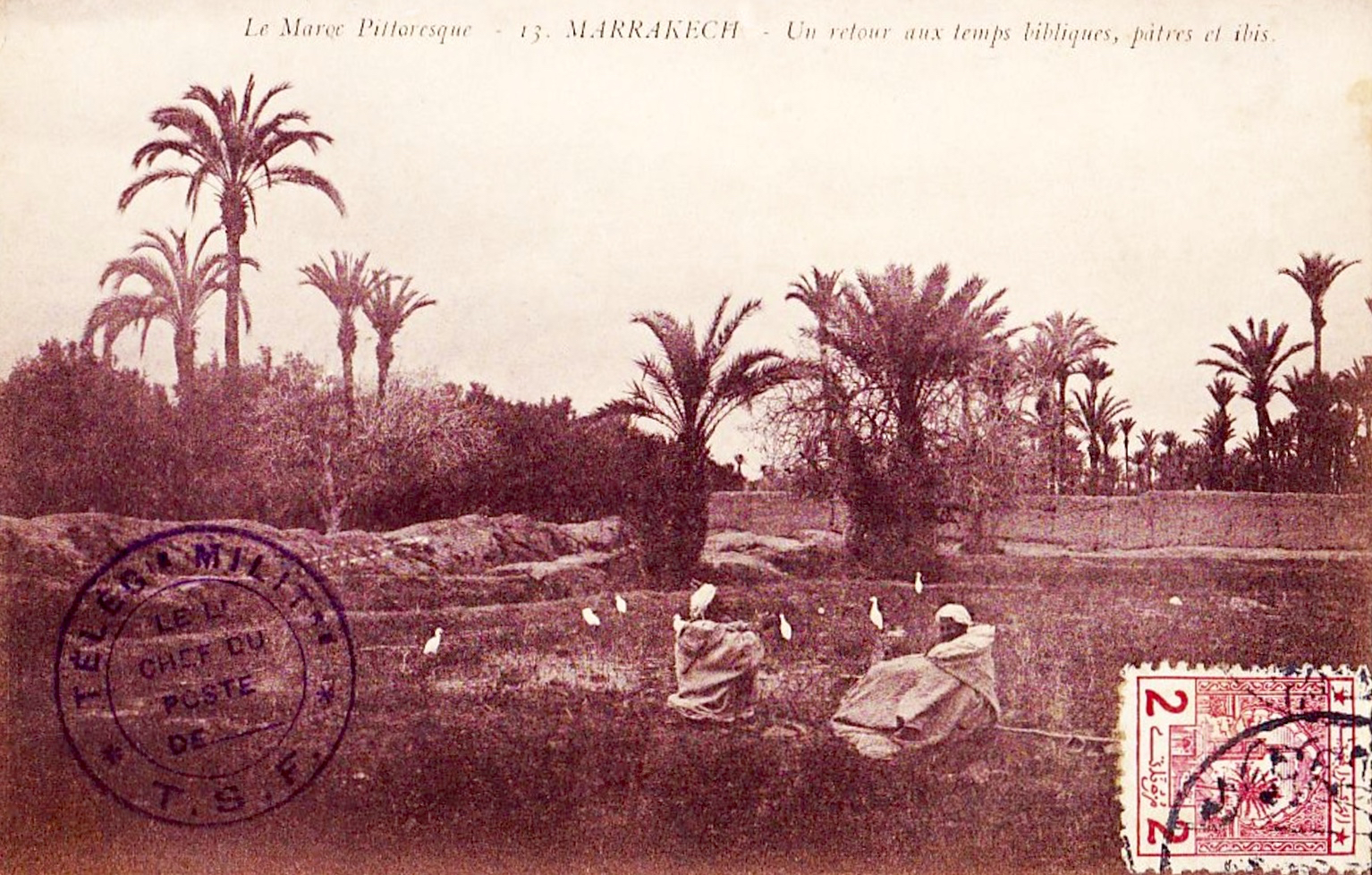 Maroc pittoresque, Marrakech, retour aux temps bibliques